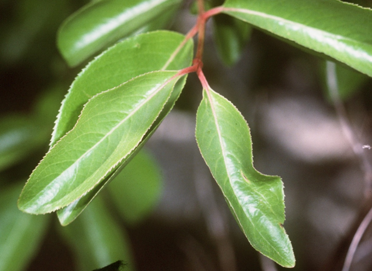 Viburnum prunifolium